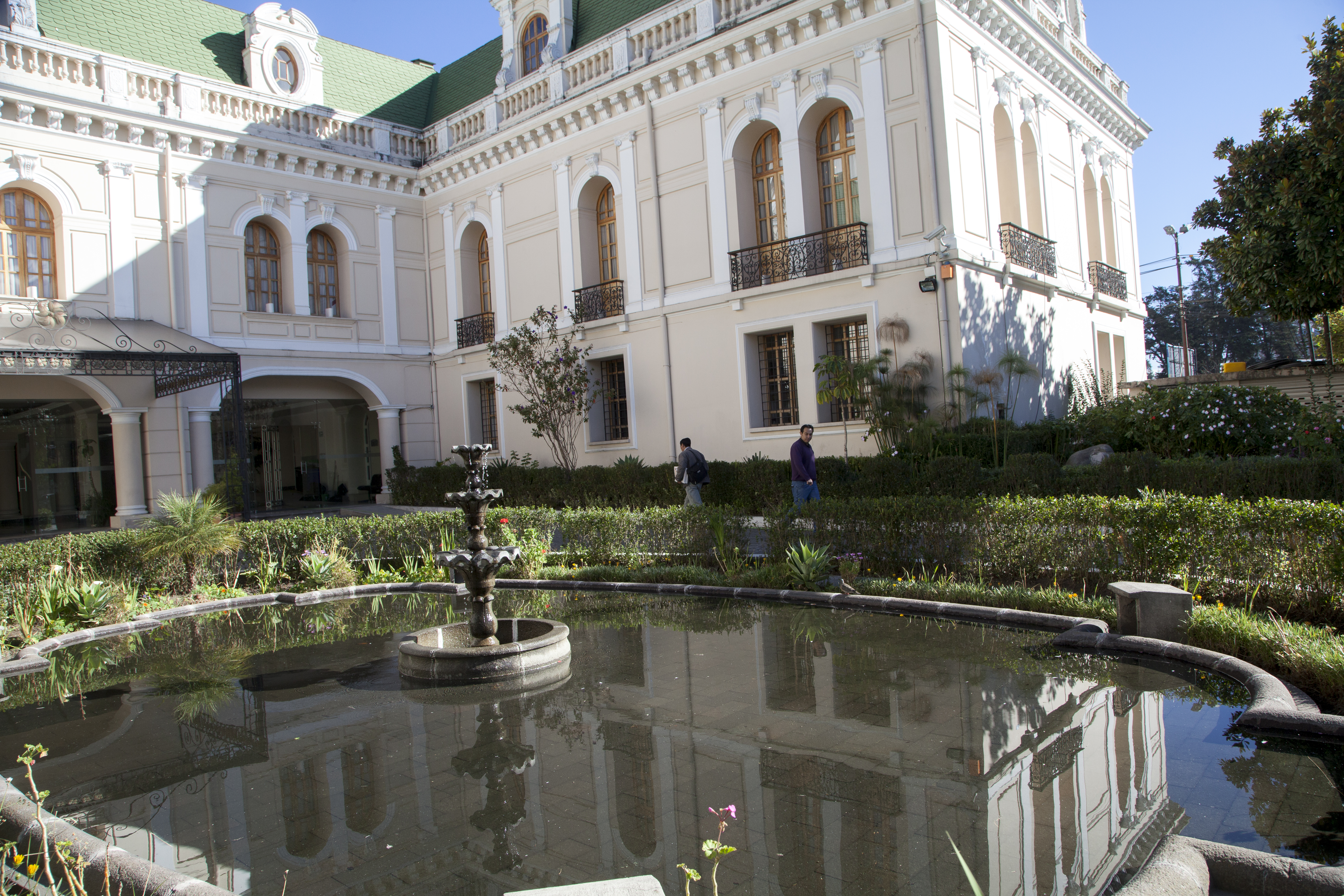 Quito (Ecuador), 11 de Julio 2014. Funcionarios del Ministerio de Relaciones Exteriores y Movilidad Humana junto a Ciclopolis, participaron de otra jornada de Al Trabajo en Bici. Foto: David Gómez Silvers. Cancillería del Ecuador.